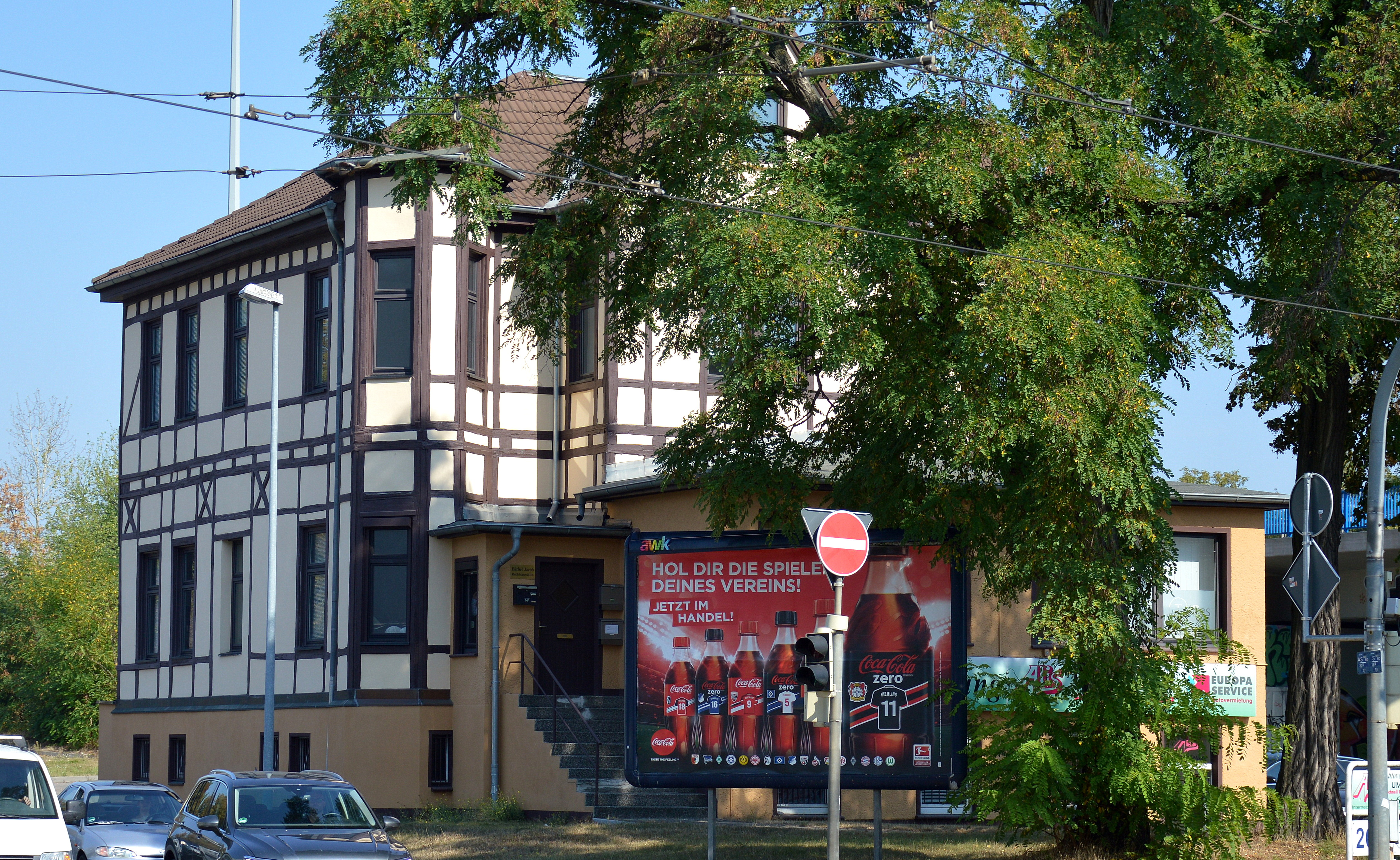 Haus Halberstädter Straße 26 a in Magdeburg